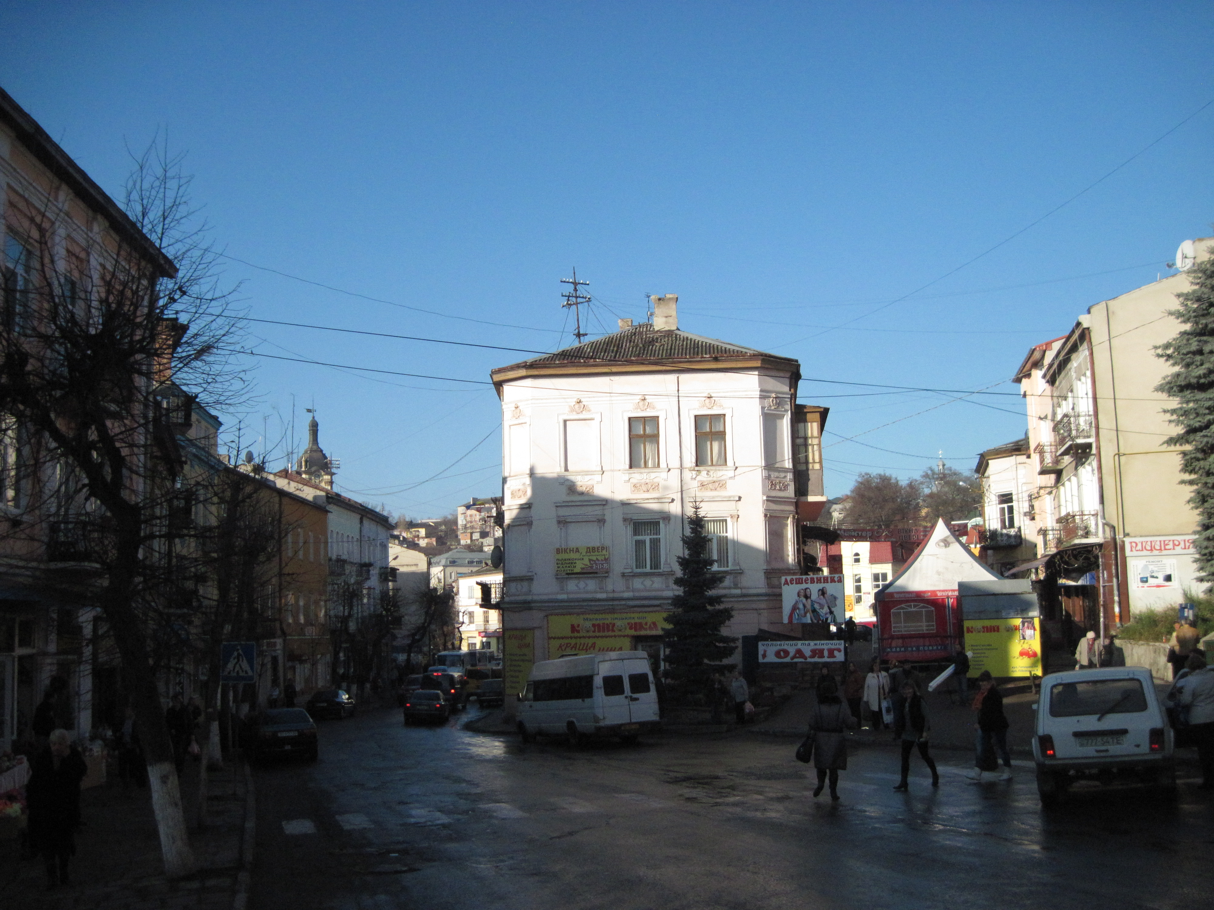 Бучач, осінь 2013